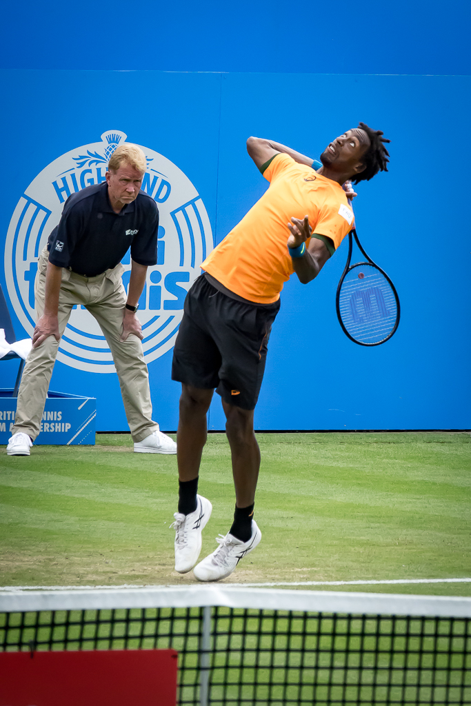 Gael Monfils